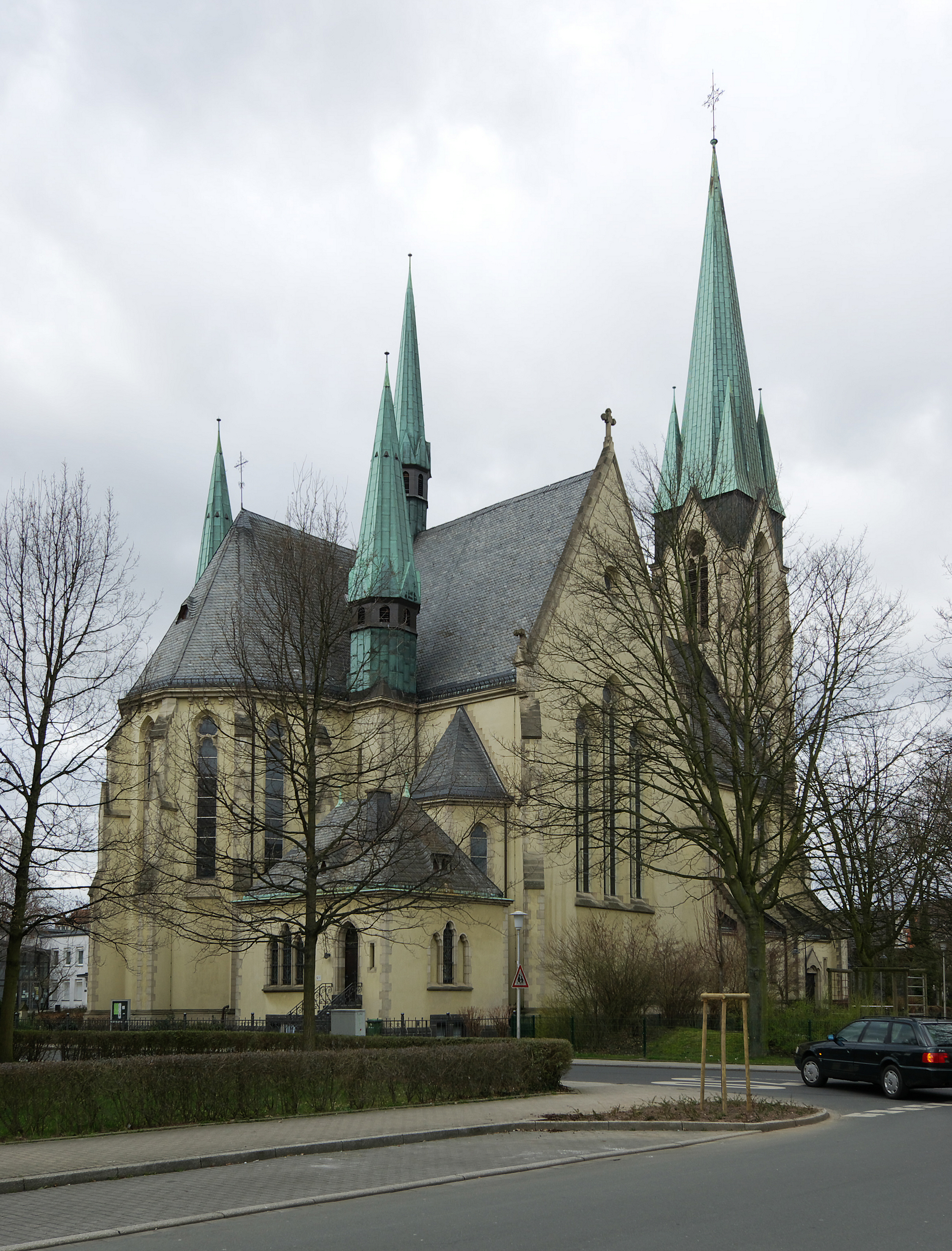 Kirche "Heilige Familie" in Kamen